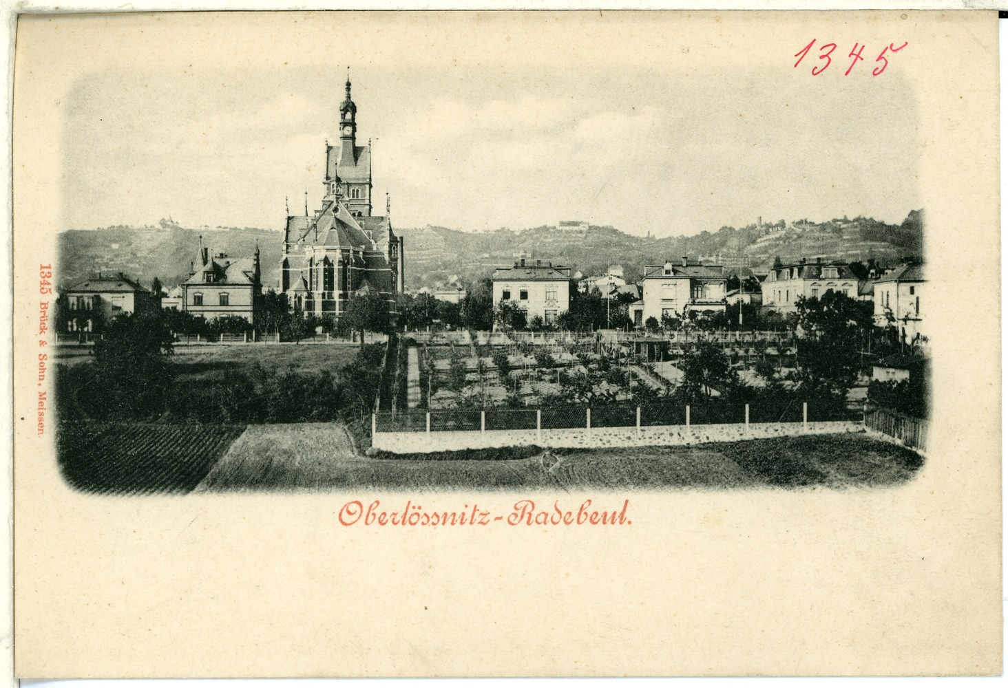 Oberlößnitz; Lutherkirche This postcard is from publisher Brück & Sohn in Meißen ( postcard has a unique number 01345 and is available in a higher resolution at the publisher. This images was uploaded in a cooperation project between Wikipedians and the publisher.